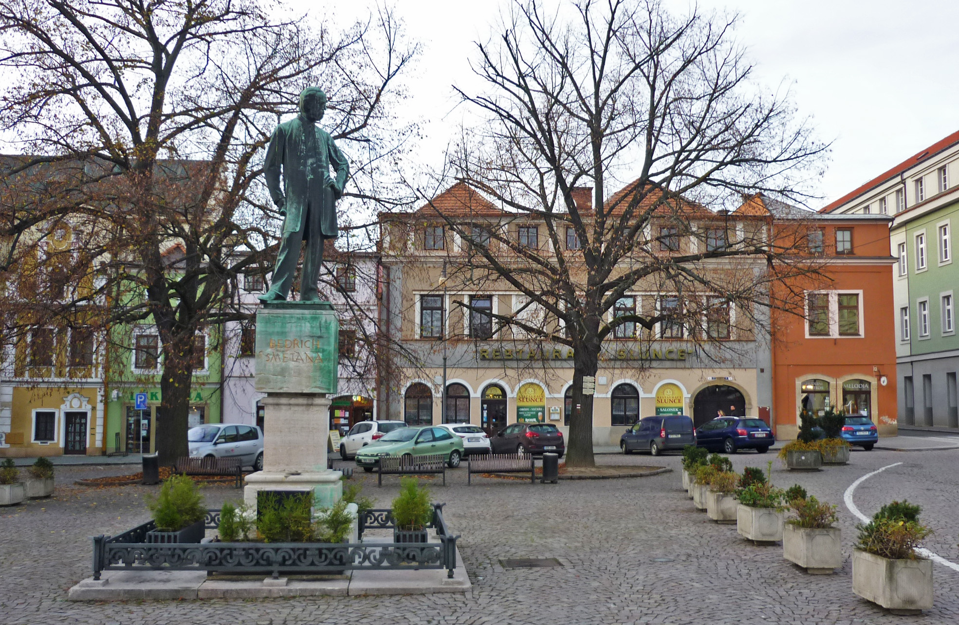 Smetana-Denkmal in Leitomischl (Litomyšl) in Böhmen